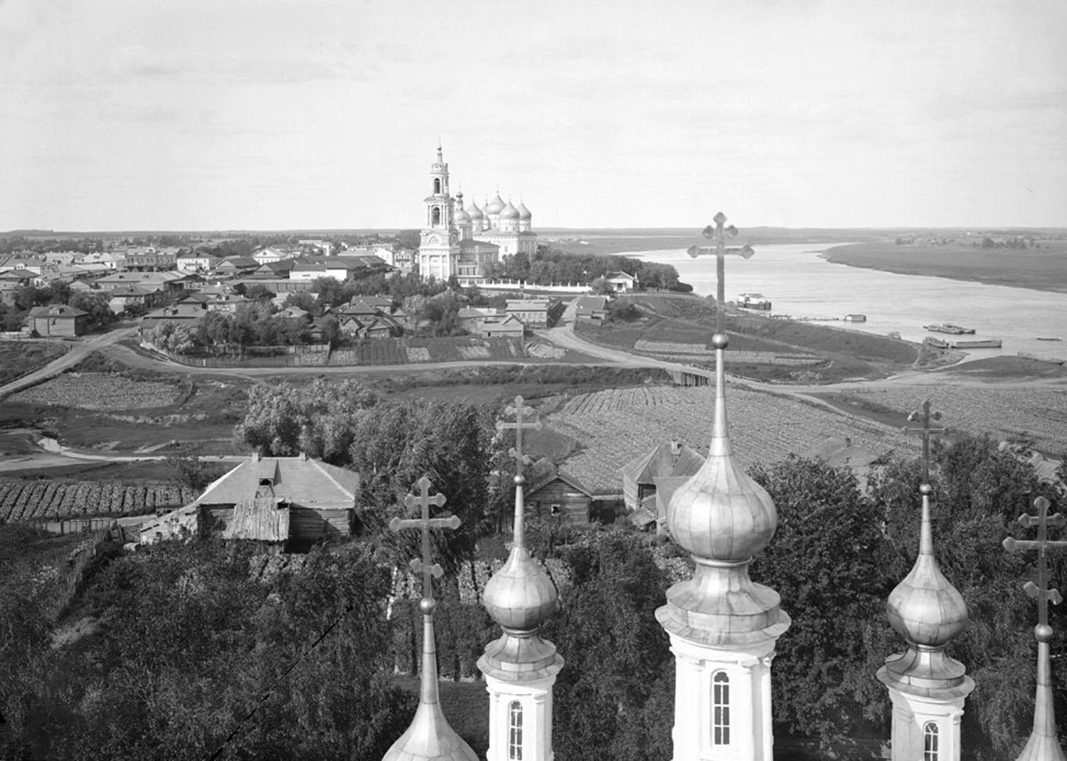 Общий вид села Кимры